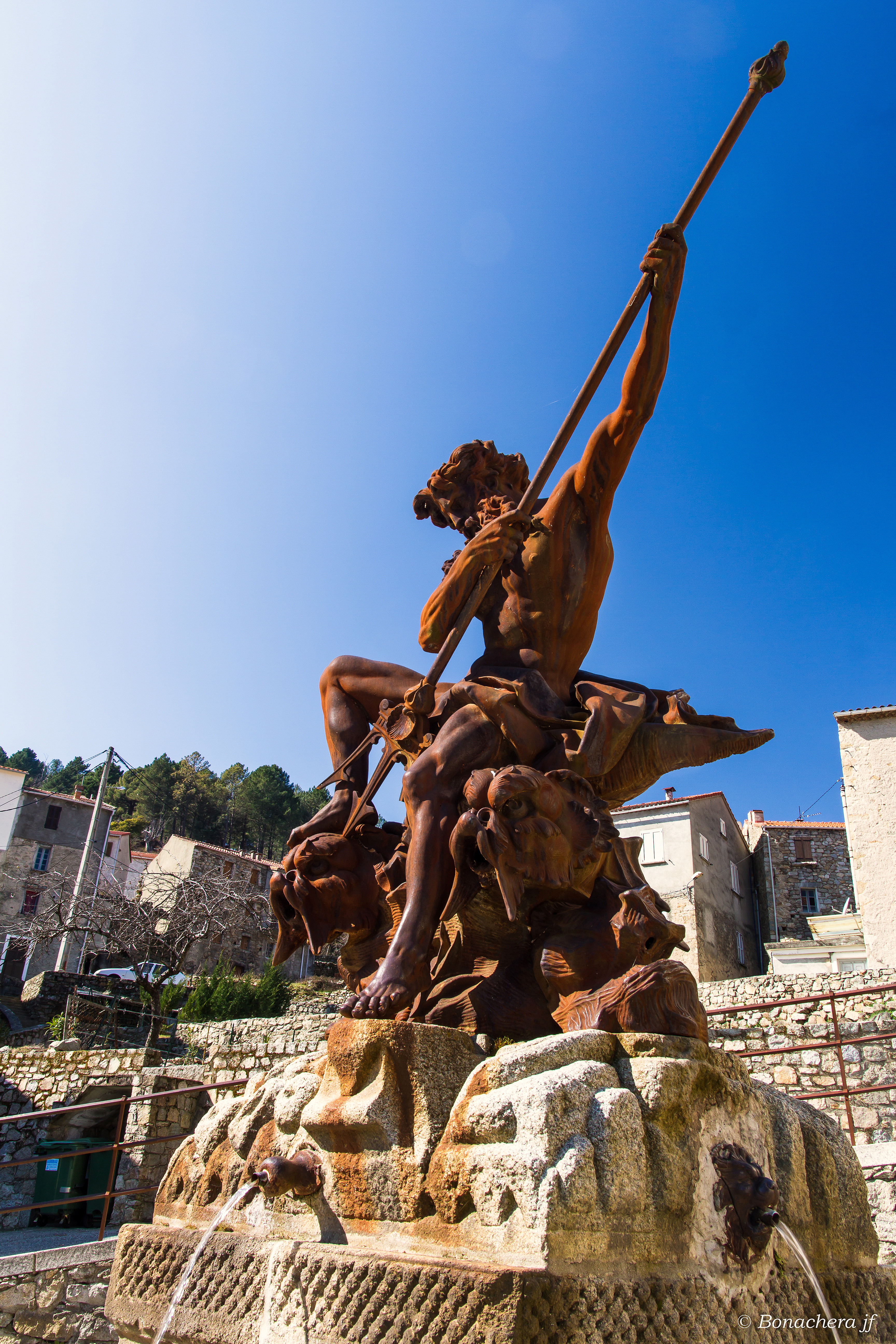 Ghisoni (Corse) - La fontaine de Neptune